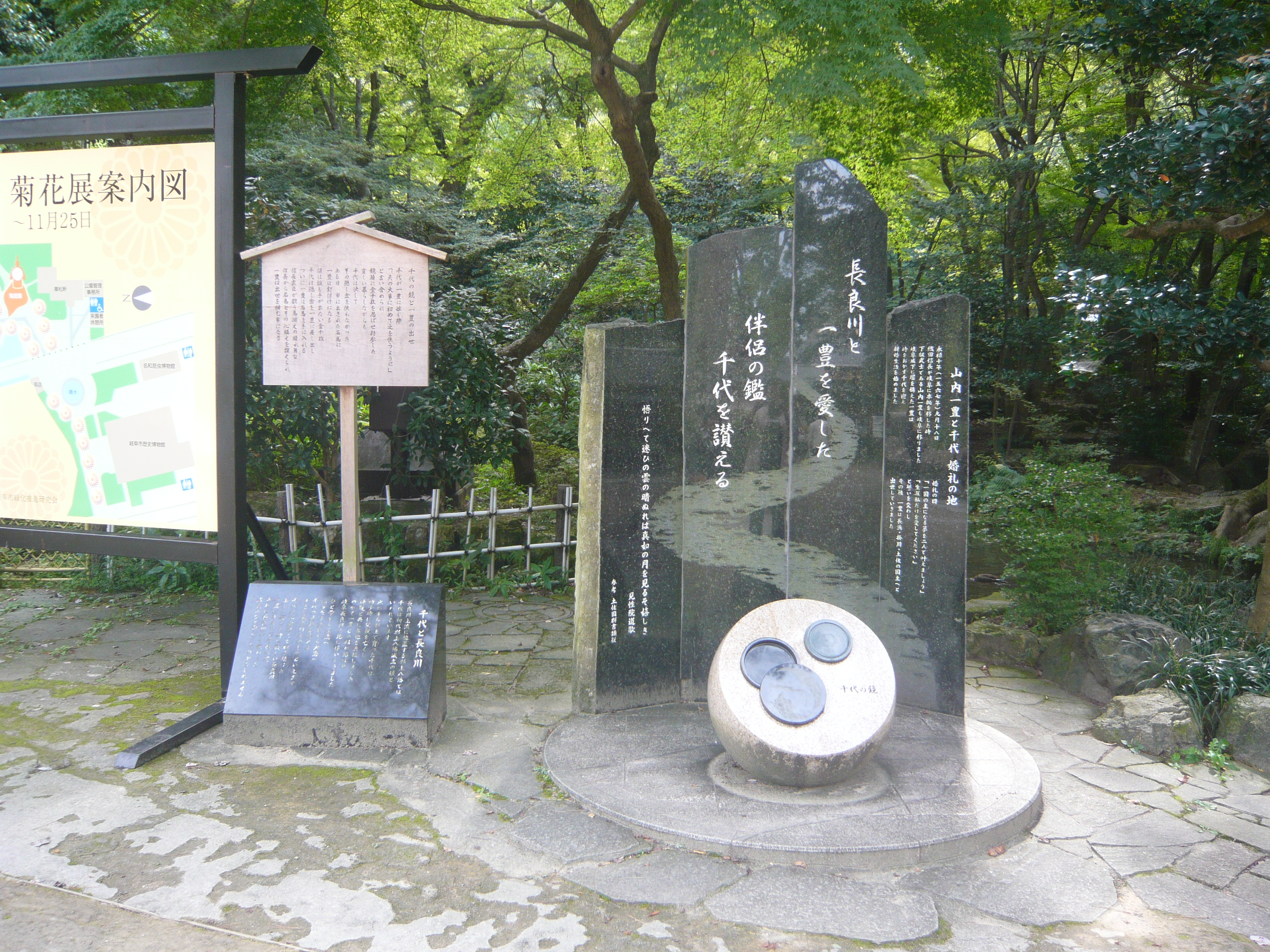 Gifu Park 「山内一豊と千代 婚礼の地」の碑（岐阜公園）,Gifu,Gifu,Japan（岐阜県岐阜市）で撮影。